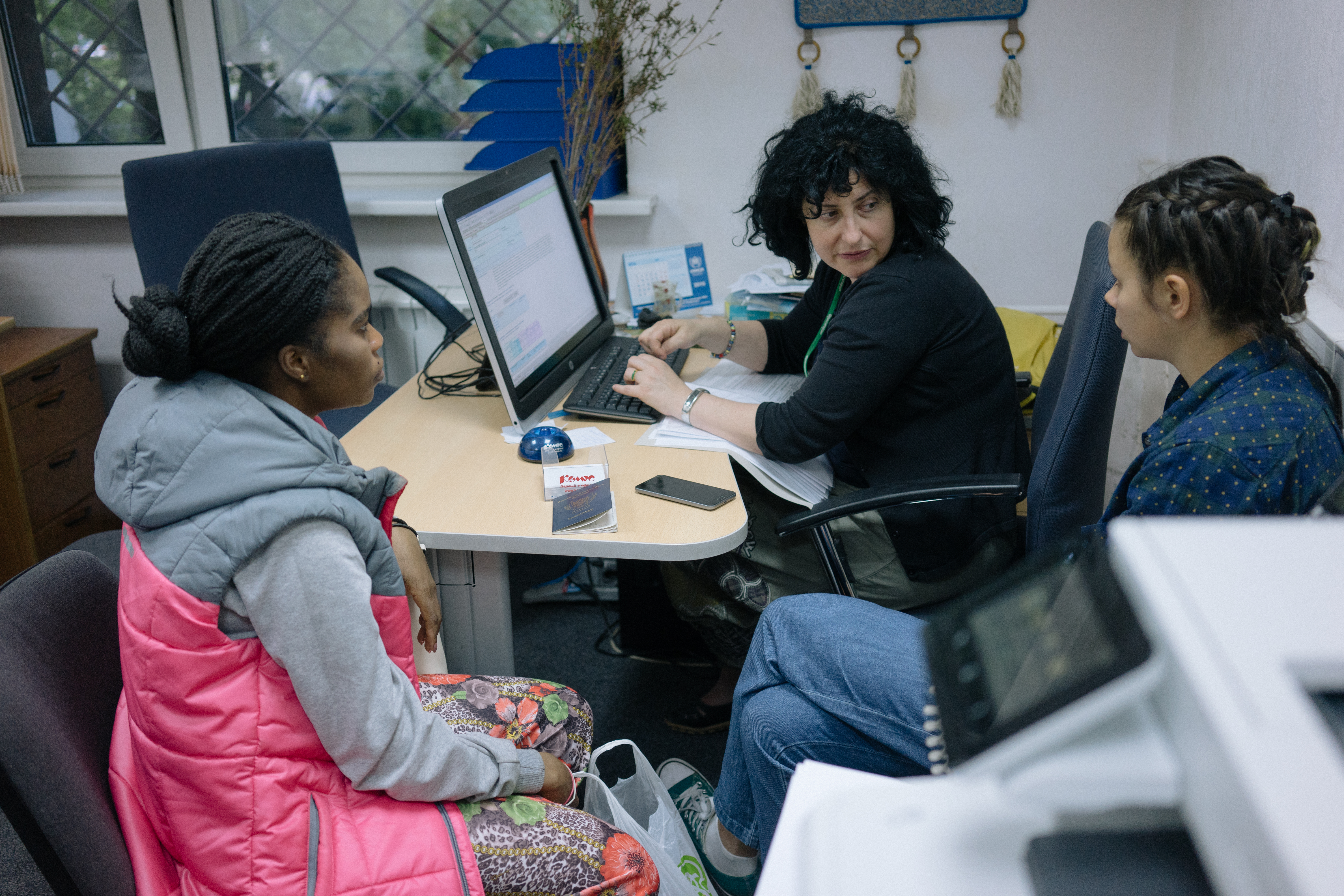 Прием в Комитете "Гражданское содействие"